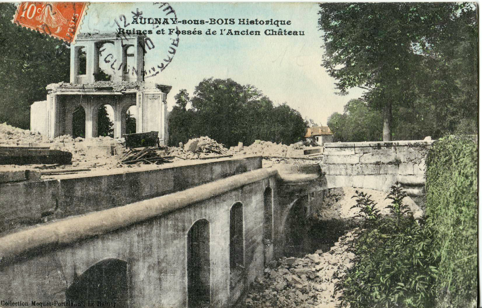 Carte postale ancienne éditée par Moquet-Portelance au Raincy : AULNAY HISTORIQUE - Ruines et fossés de l'Ancien Château